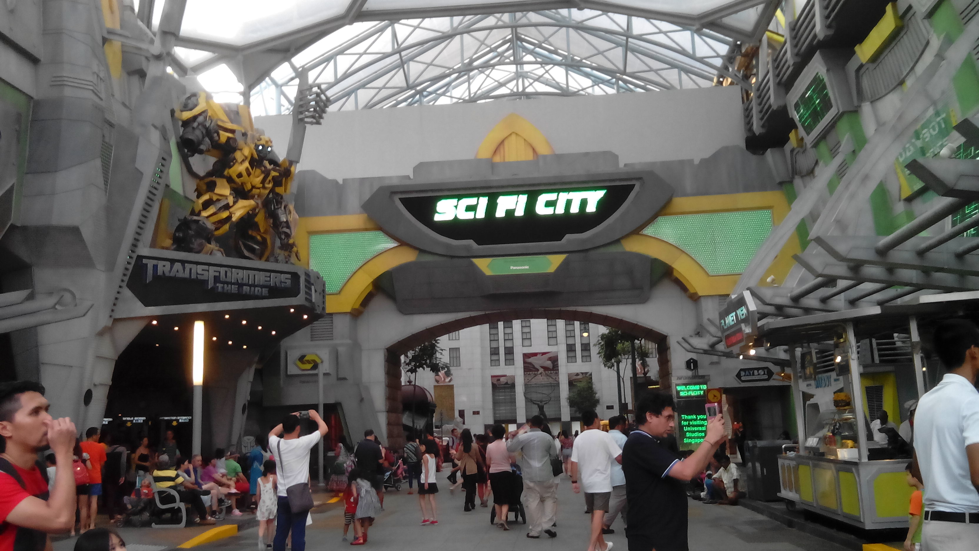 中文（香港）: 攝「新加坡環球影城」內的「科幻城市」。